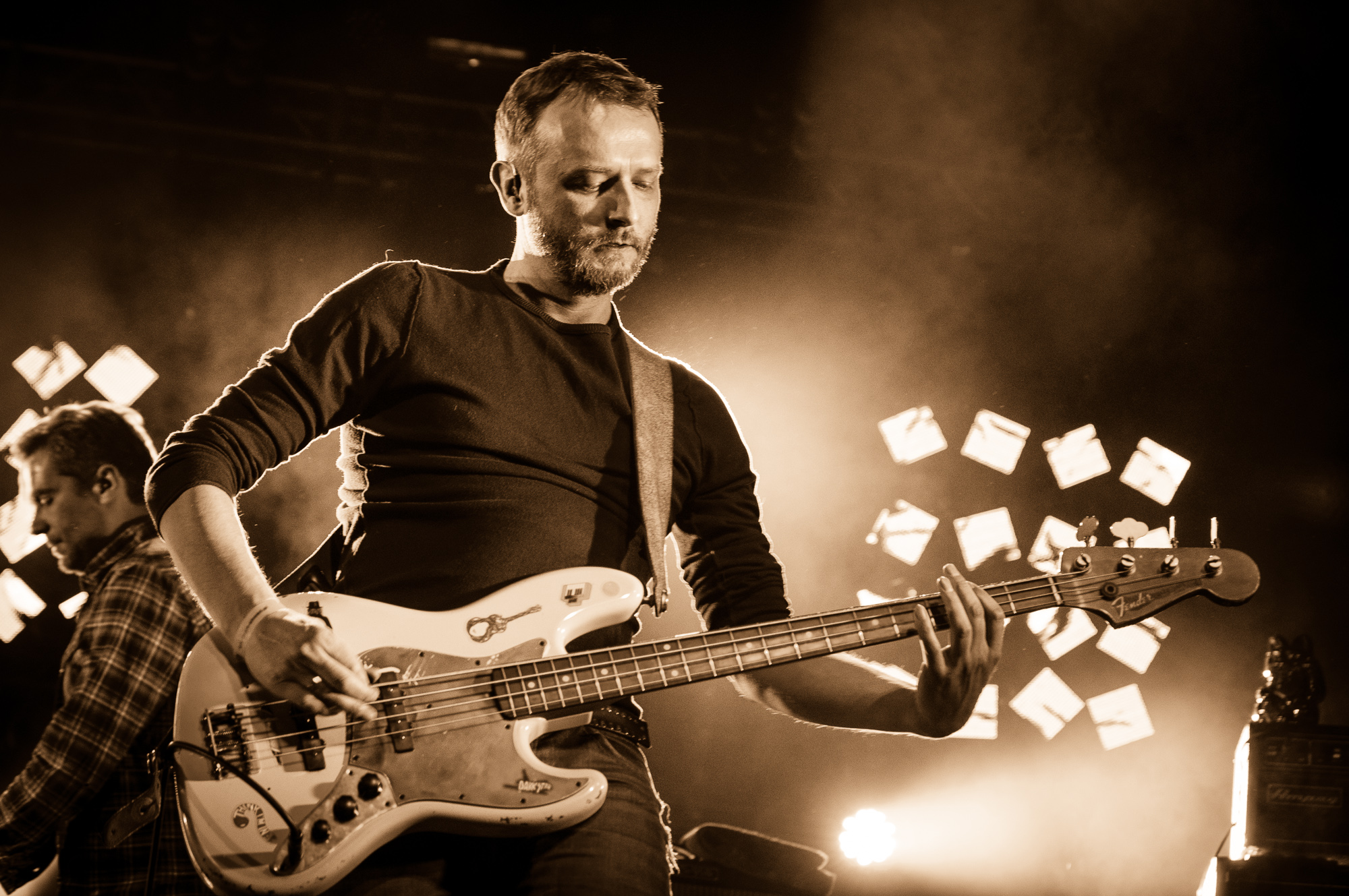 Jacek Chrzanowski, basista zespołu Chemia podczas Rocket Festiwal 2013 w Warszawie.